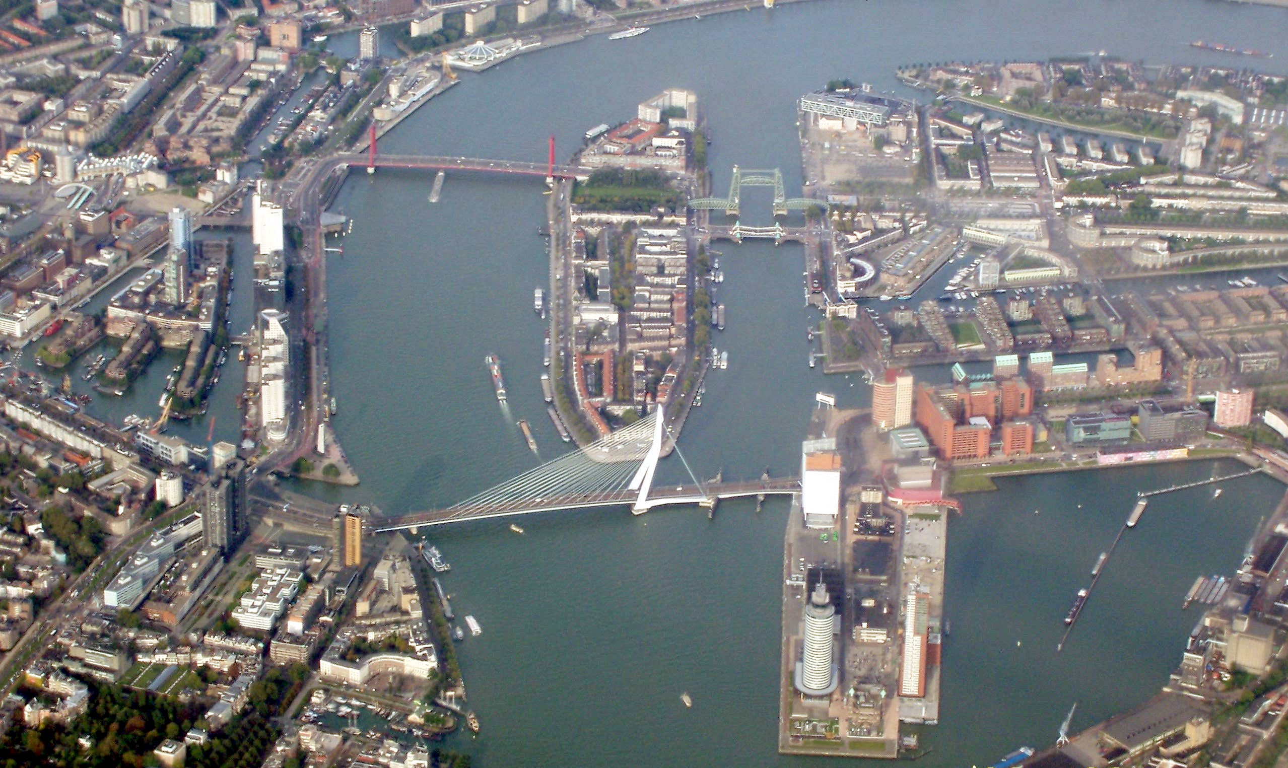 Categorie:Luchtfoto Categorie:Lucht-satelietfoto Rotterdam (Original text: Luchfoto van Rotterdam / Erasmusbrug / Kop van Zuid)